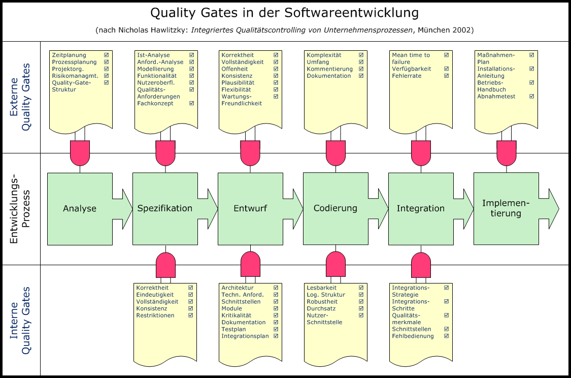 Quality Gates in der Softwareentwicklung. Nach Nicholas Hawlitzky: Integriertes Qualitätscontrolling von Unternehmensprozessen, TCW, München 20002